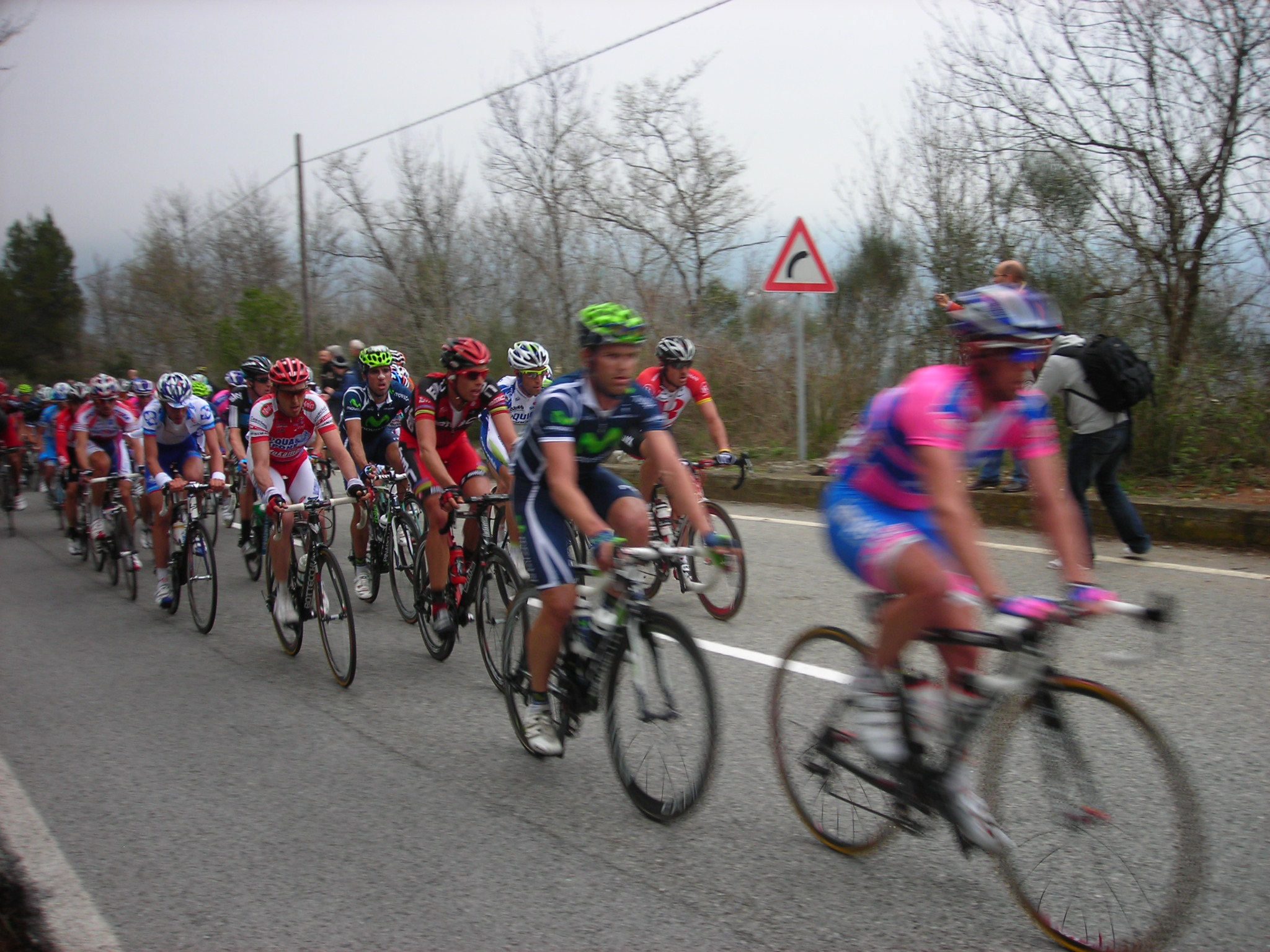 Il gruppo sulle Manie alla Milano-Sanremo 2011